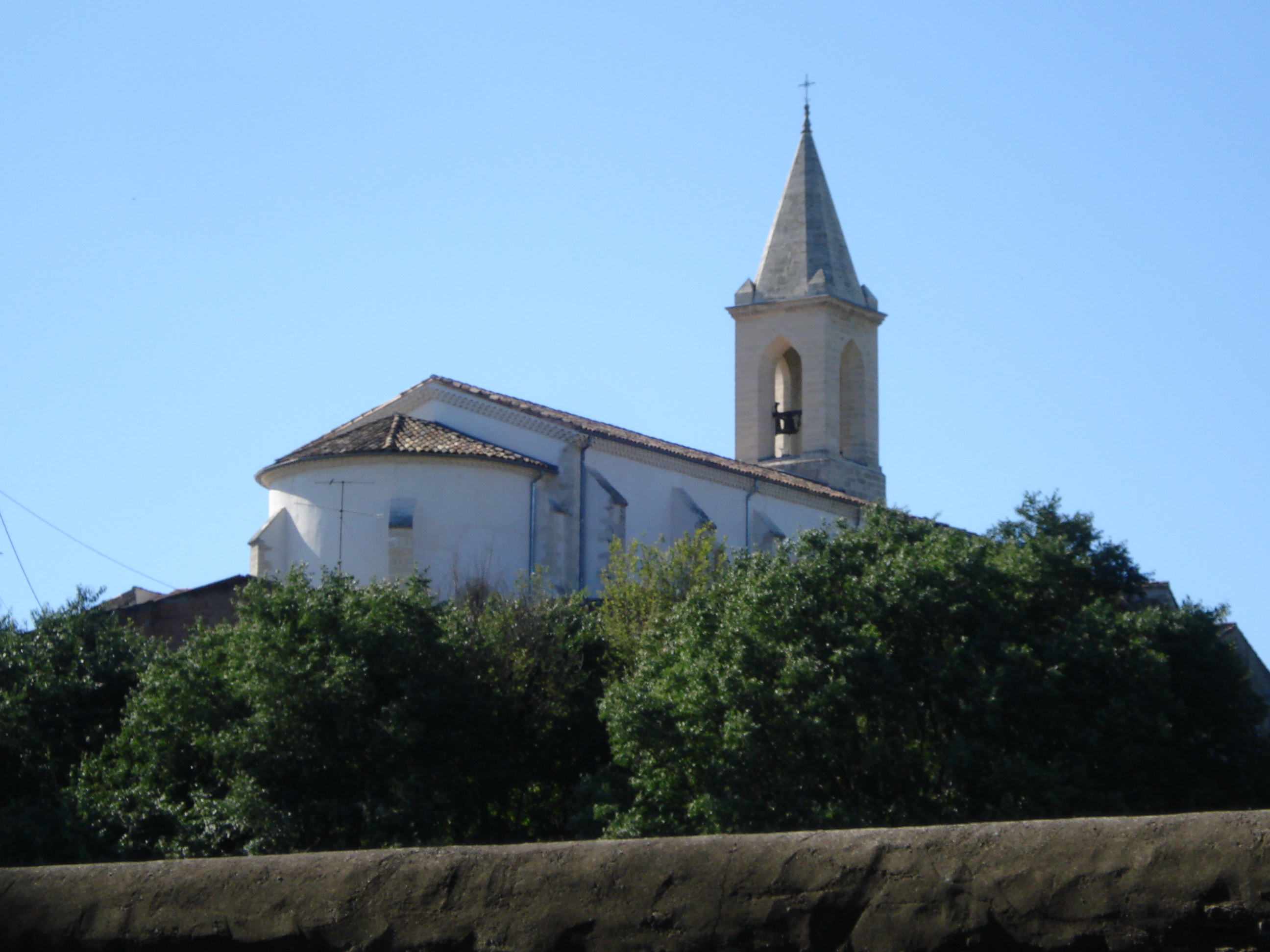 Dions (Gard, Fr), église de Vic.